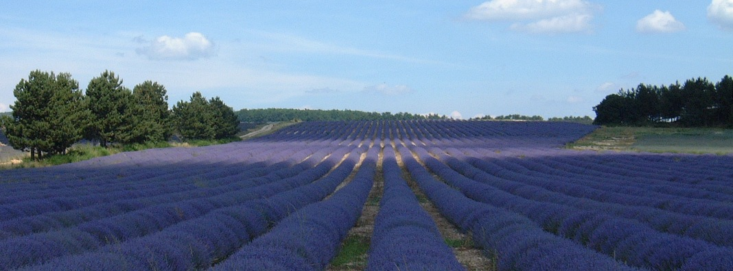 Lavande en Provence